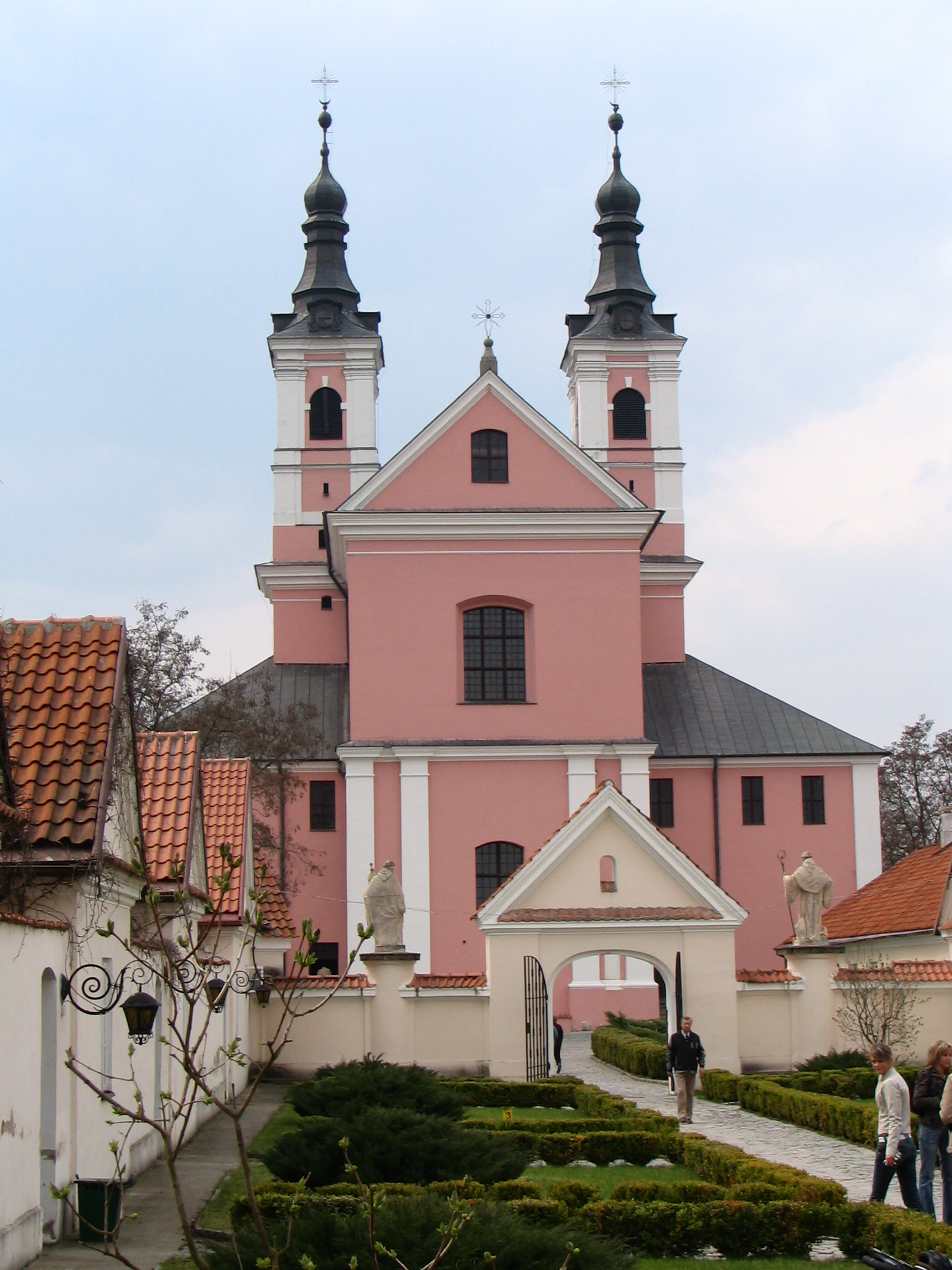 Wigry 11 - zespół klasztorny kamedułów: kościół, obecnie parafialny p.w. Niepokalanego Poczęcia NMP, po lewej stronie eremy - domy pustelnicze